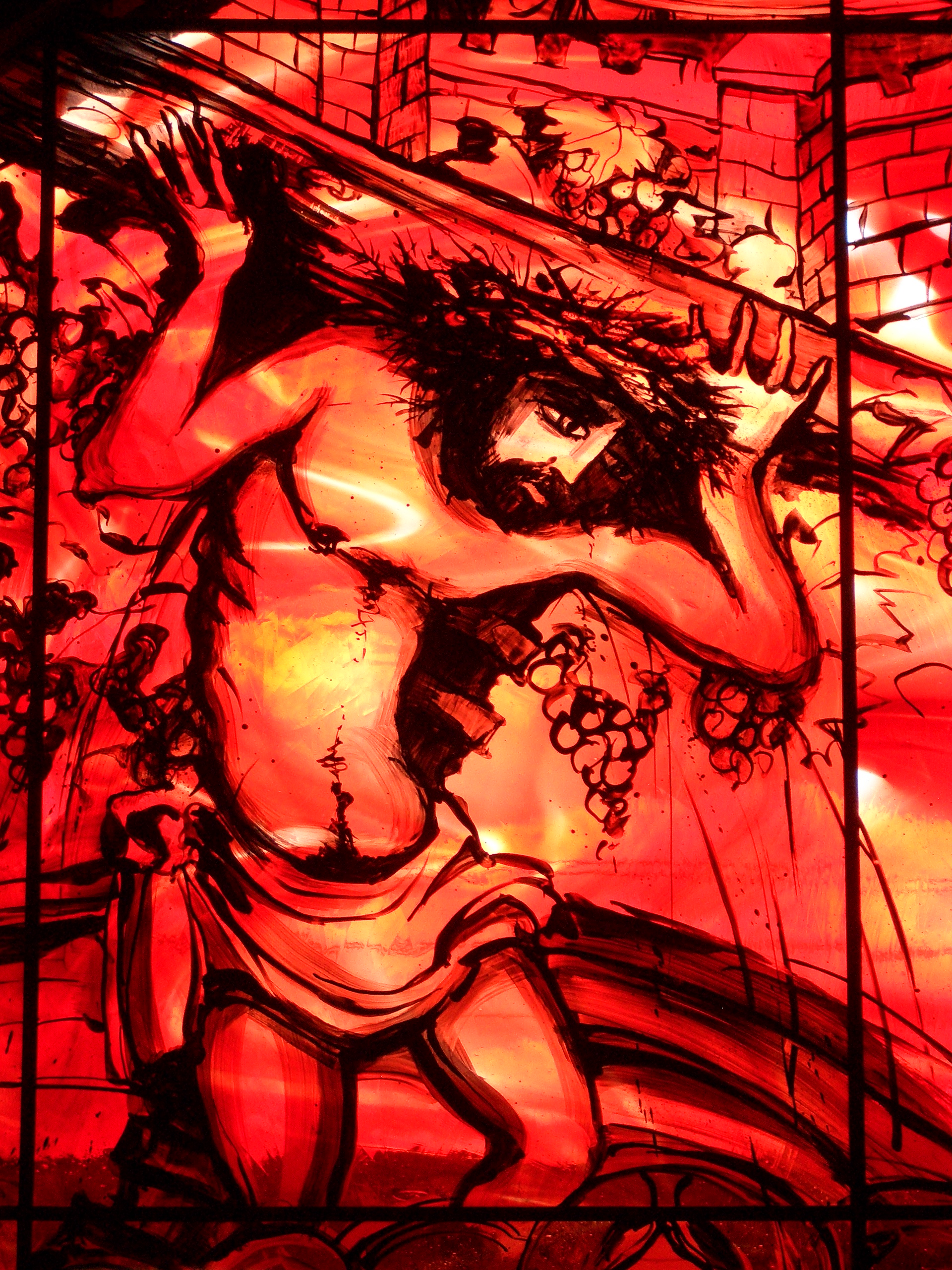 Der "Klüsserather Keltertreter" ist eine Glasmalerei von Andreas Armin d´Orfey im Krippenmuseum "Domus praesepiorum". Foto: A. d´Orfey, Kunst im Licht, München, 2012